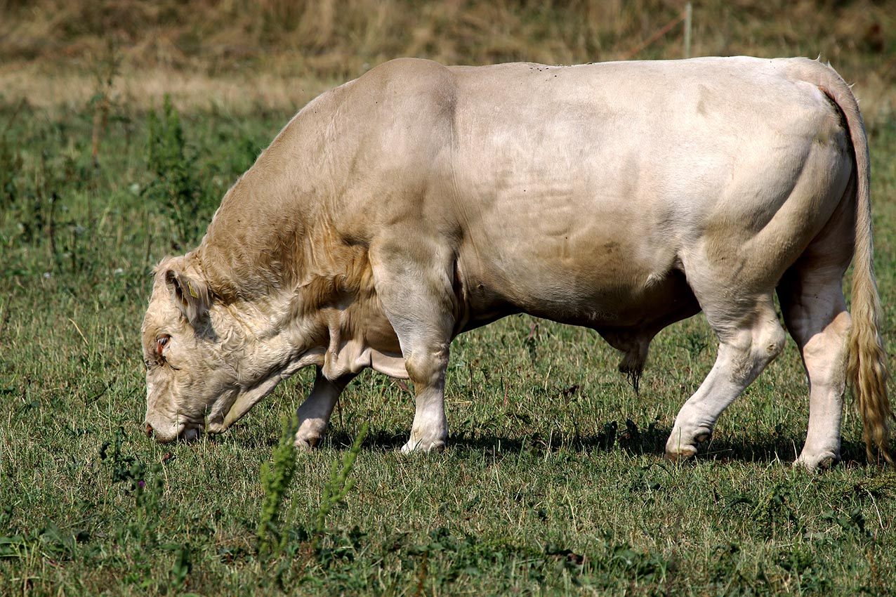 Charolaisbulle auf dem Großen Schwerin in Mecklenburg